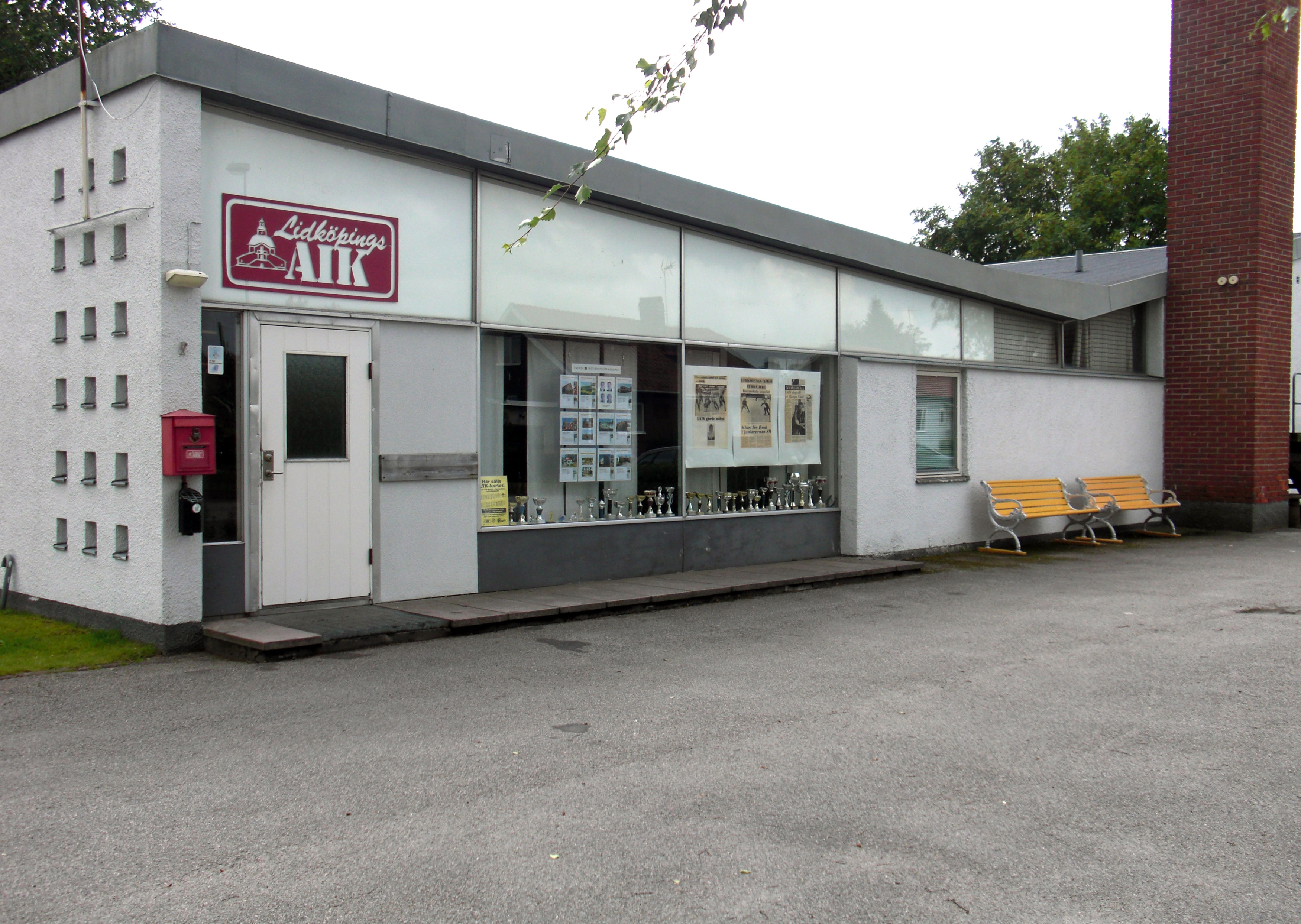 Lidköpings AIKs kansli och klubbhus